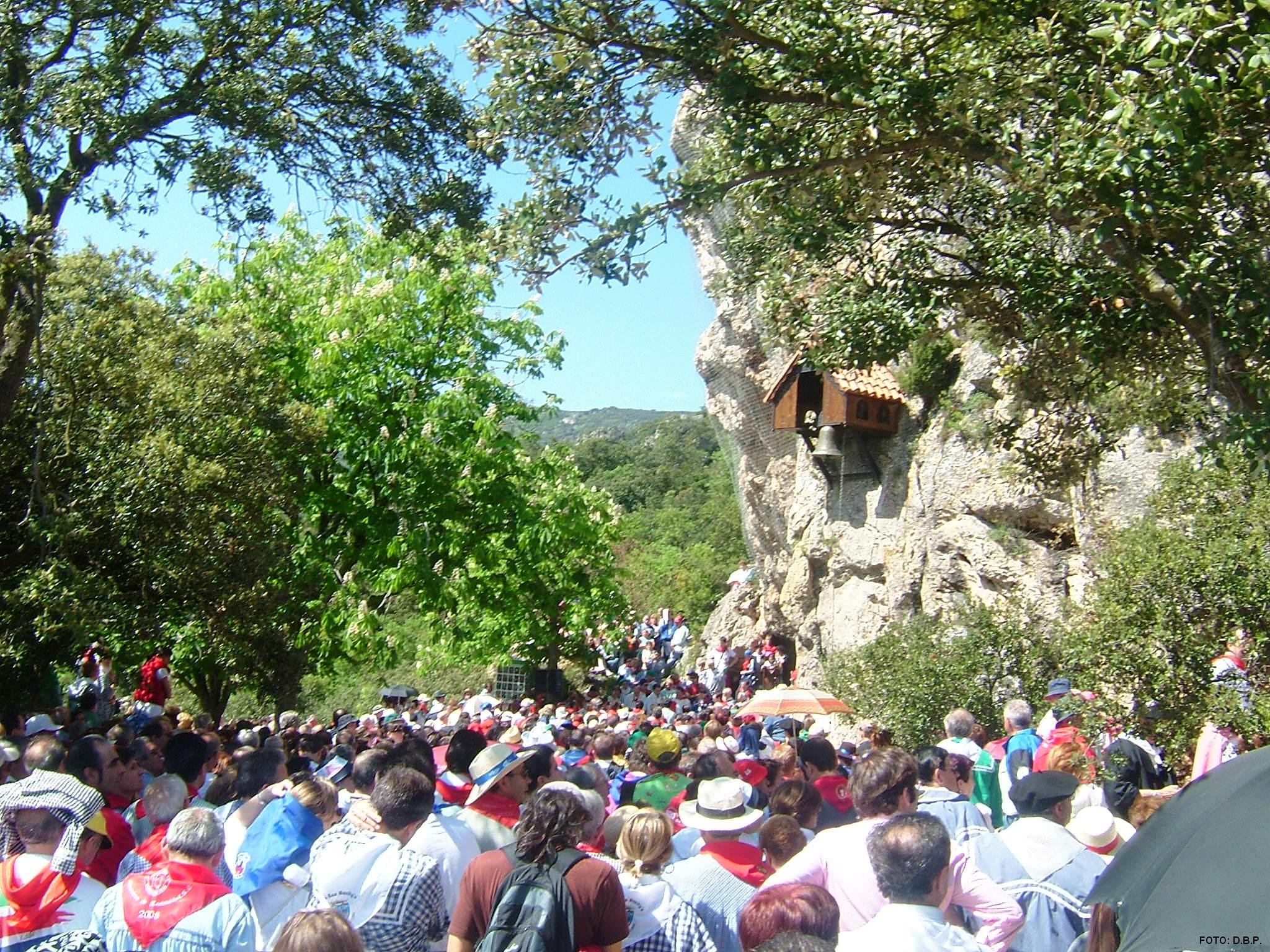 Misa en el entorno de la ermita de San Juan del Monte de Miranda de Ebro, España